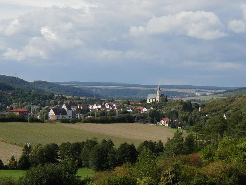 Gemeinde Eußenheim